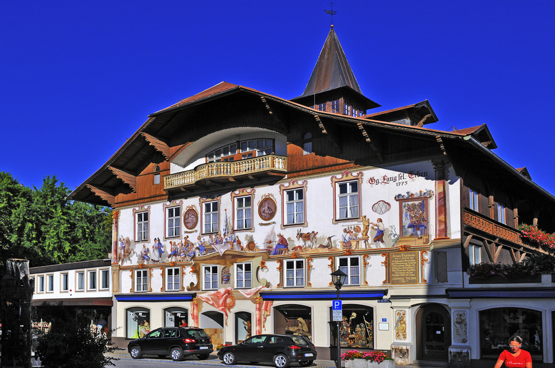 Oberammergau